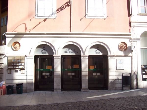 Udine (Friuli-Venezia Giulia-Italy), la sede della sezione moderna della Biblioteca Civica Joppi